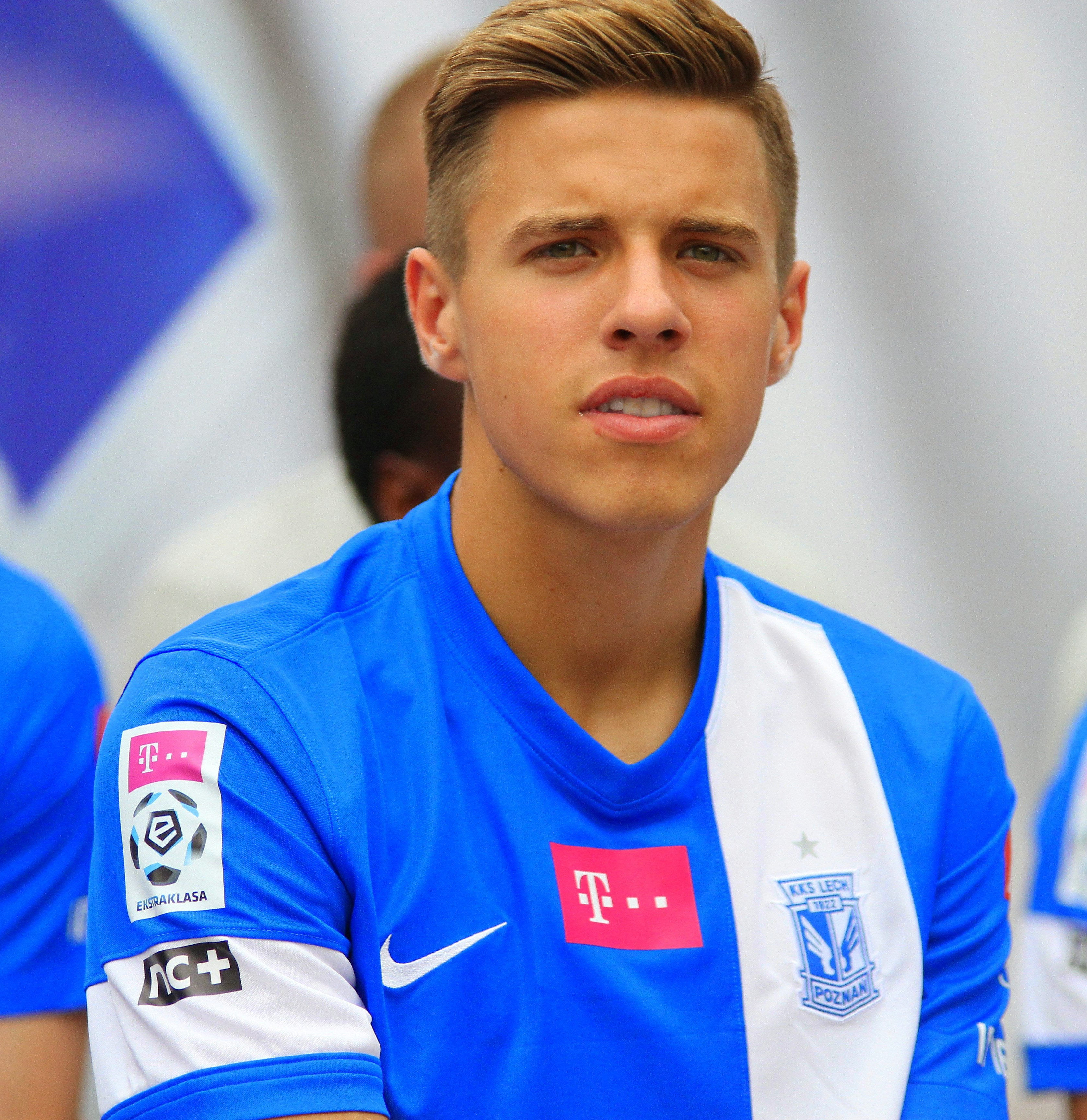 Jan Bednarek podczas prezentacji kadry Lecha Poznań przed sezonem 2014/15